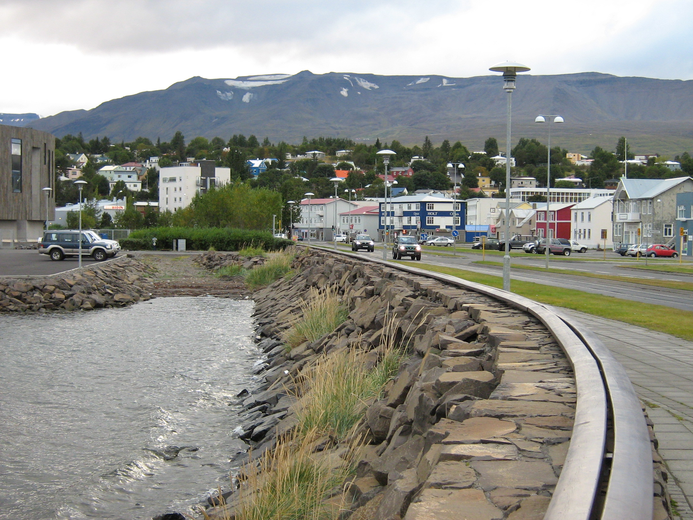 Island Akureyri Hafen